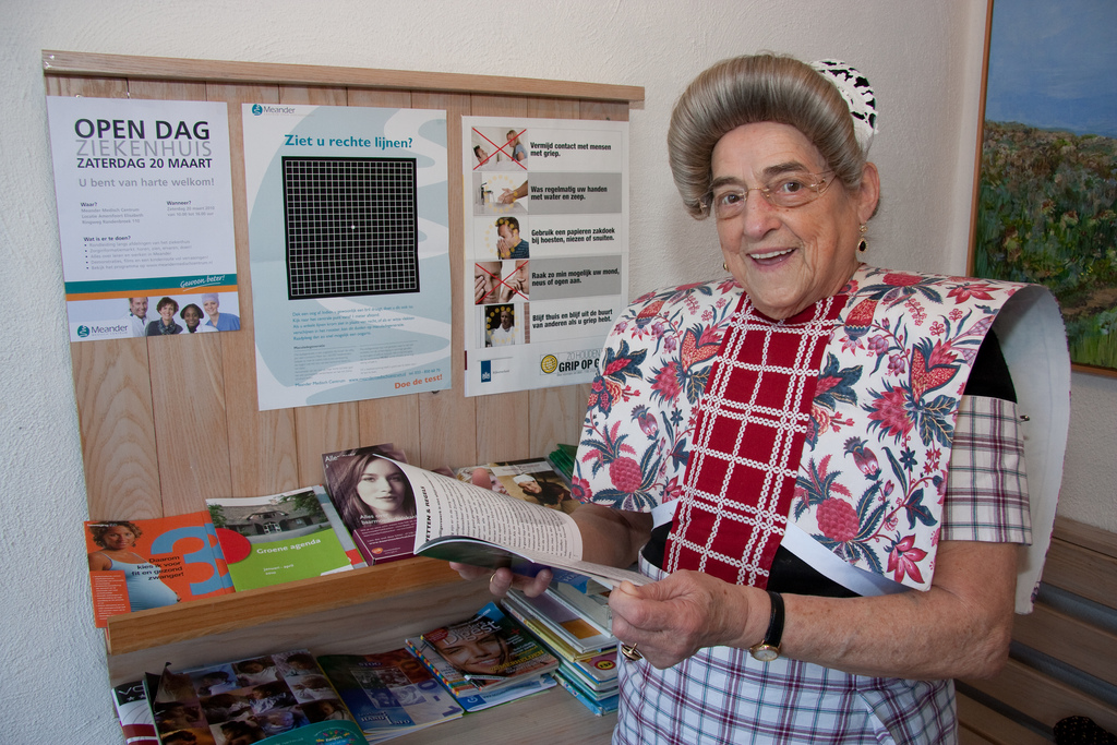 Spakenburg is een van de weinige Nederlandse plaatsen waar - vooral oudere - vrouwen nog klederdracht dragen.